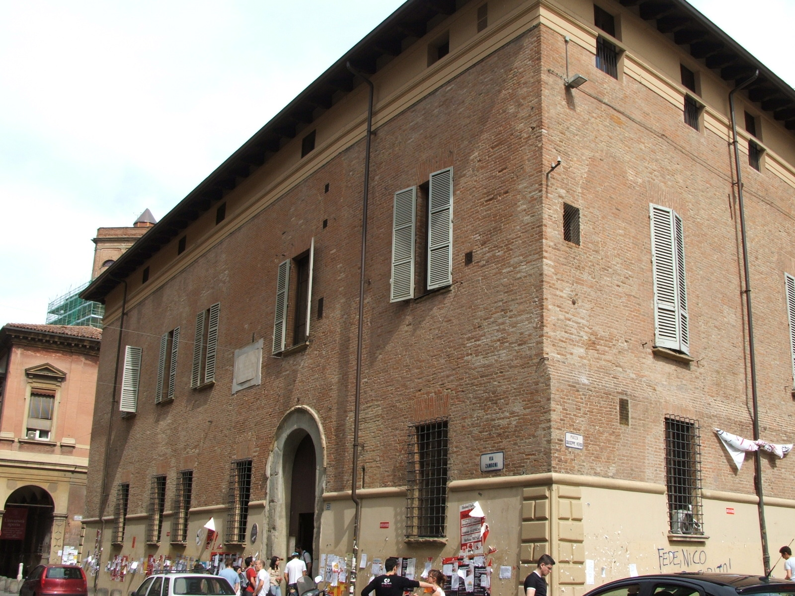 Bologna, maggio 2006 Bologna, Palazzo Paleotti. Casa di Aurelio Saffi, ora sede universitaria.